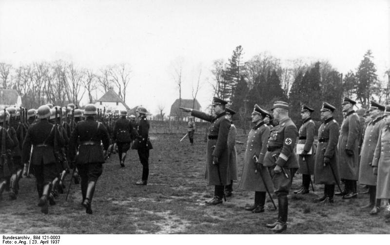 Besichtigung der Schutzpolizei Bremen, Generalleutnant Daluege, Generalmajor v. Bomhard (halb verdeckt), - Oberst d. Sch. Dr. Lankenau, - Reg. Bgm. SaSt. Böhmker, - Oberstleutnant Sch. Scholz, - Oberstleutnant Sch. Becker W. - Mj. d. Gd. Meyßner, - Oberstleutnant Sch. Worm